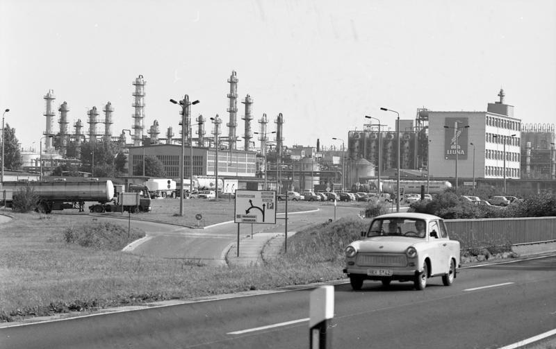 11.-18.8.1991 Bundesland Sachsen-Anhalt Leuna, Industriegebiet